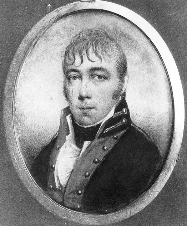 Portrait de William Bainbridge réalisé en 1798